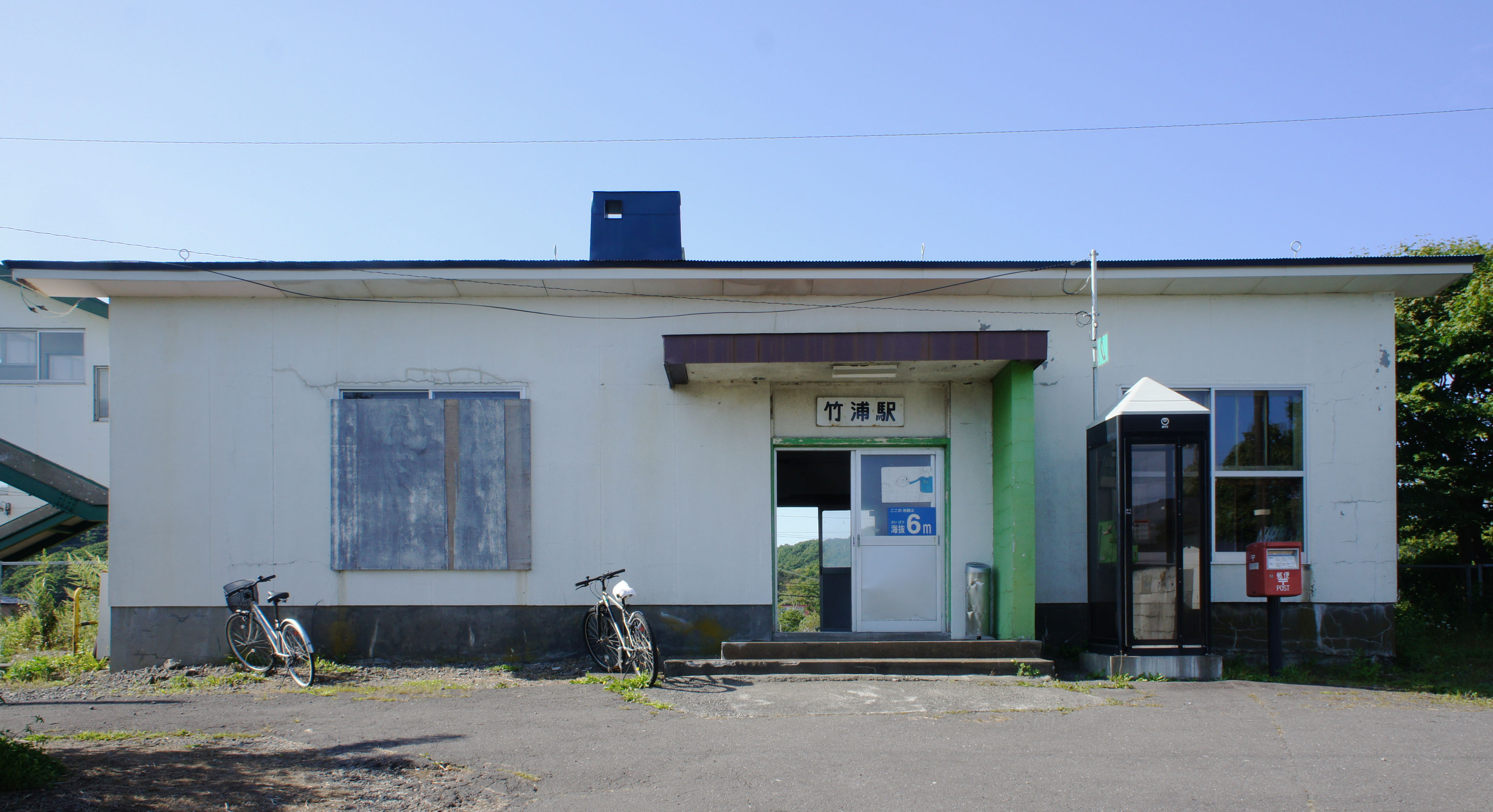 JR室蘭本線・竹浦駅の駅舎